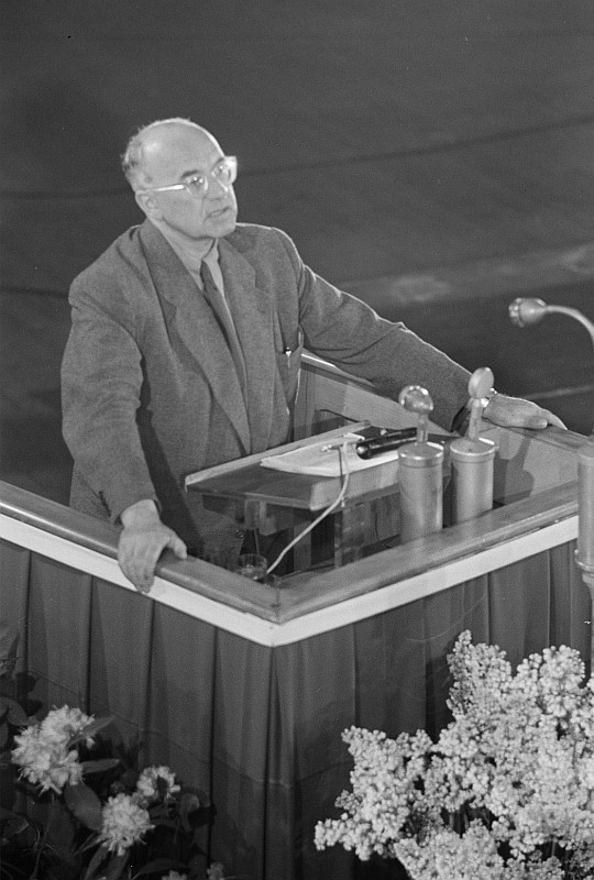 Original image description from the Deutsche Fotothek Rede von Johannes R. Becher